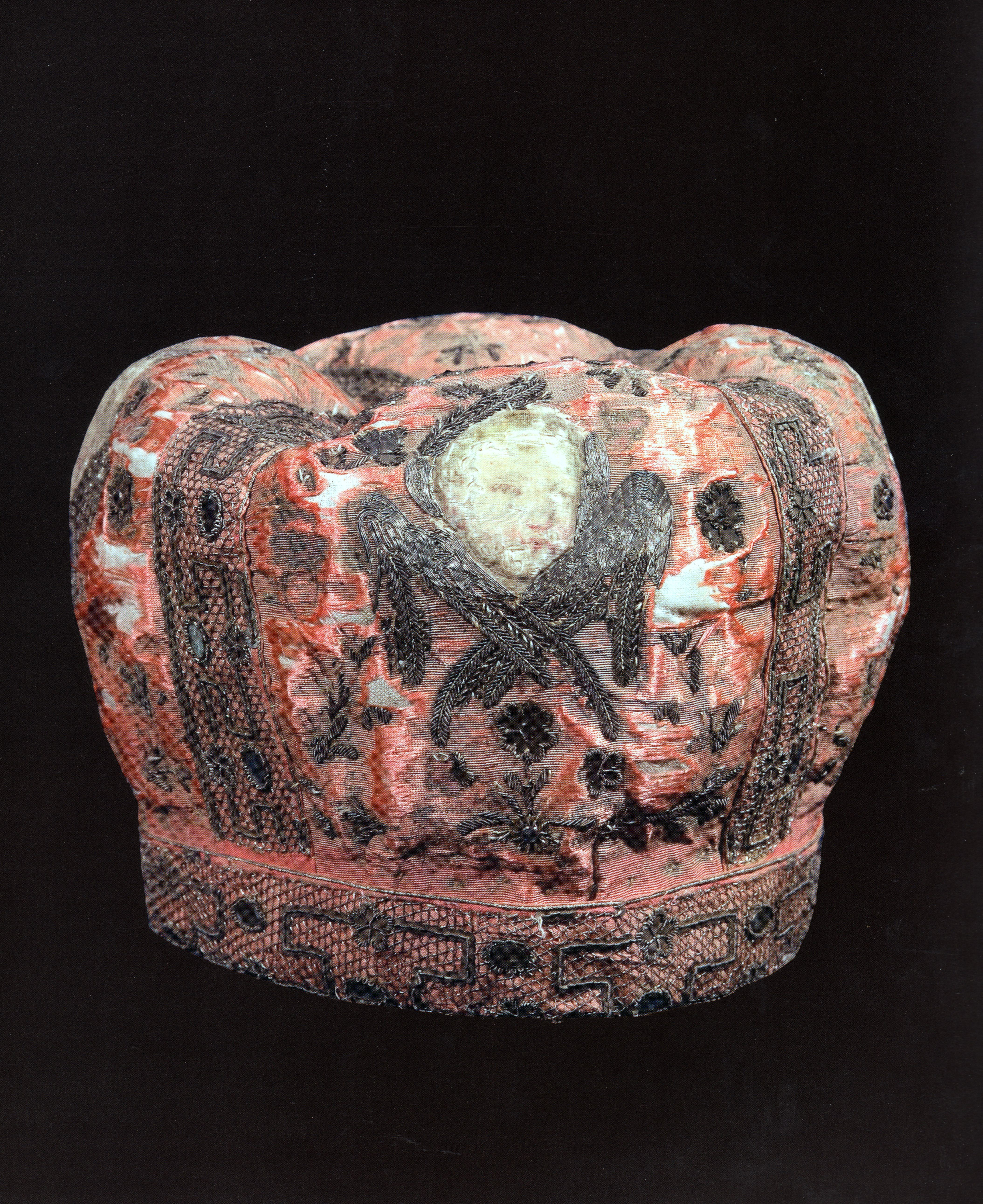 Mitra, taffetas laminato ricamato, manifattura del primo trentennio del XIX secolo, Piana degli Albanesi, Cattedrale di San Demetrio Megalomartire.